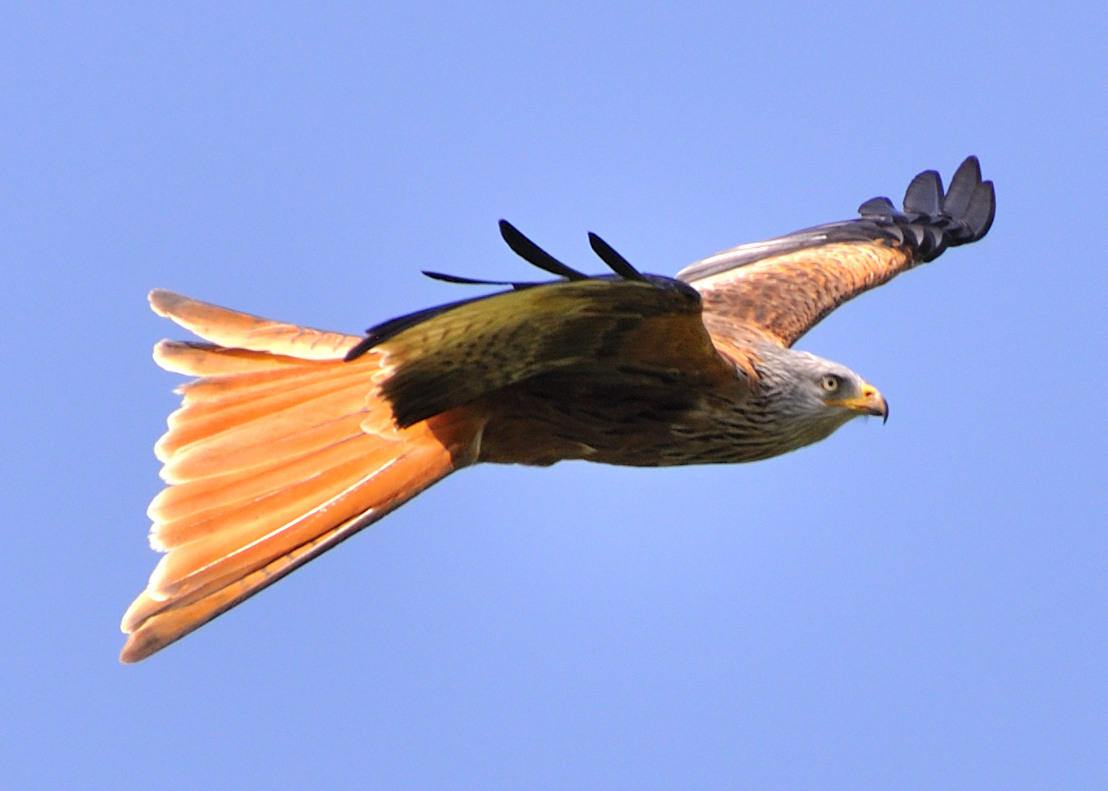 Switzerland, Canton of Schaffhausen, red kite in flight near Gennersbrunn